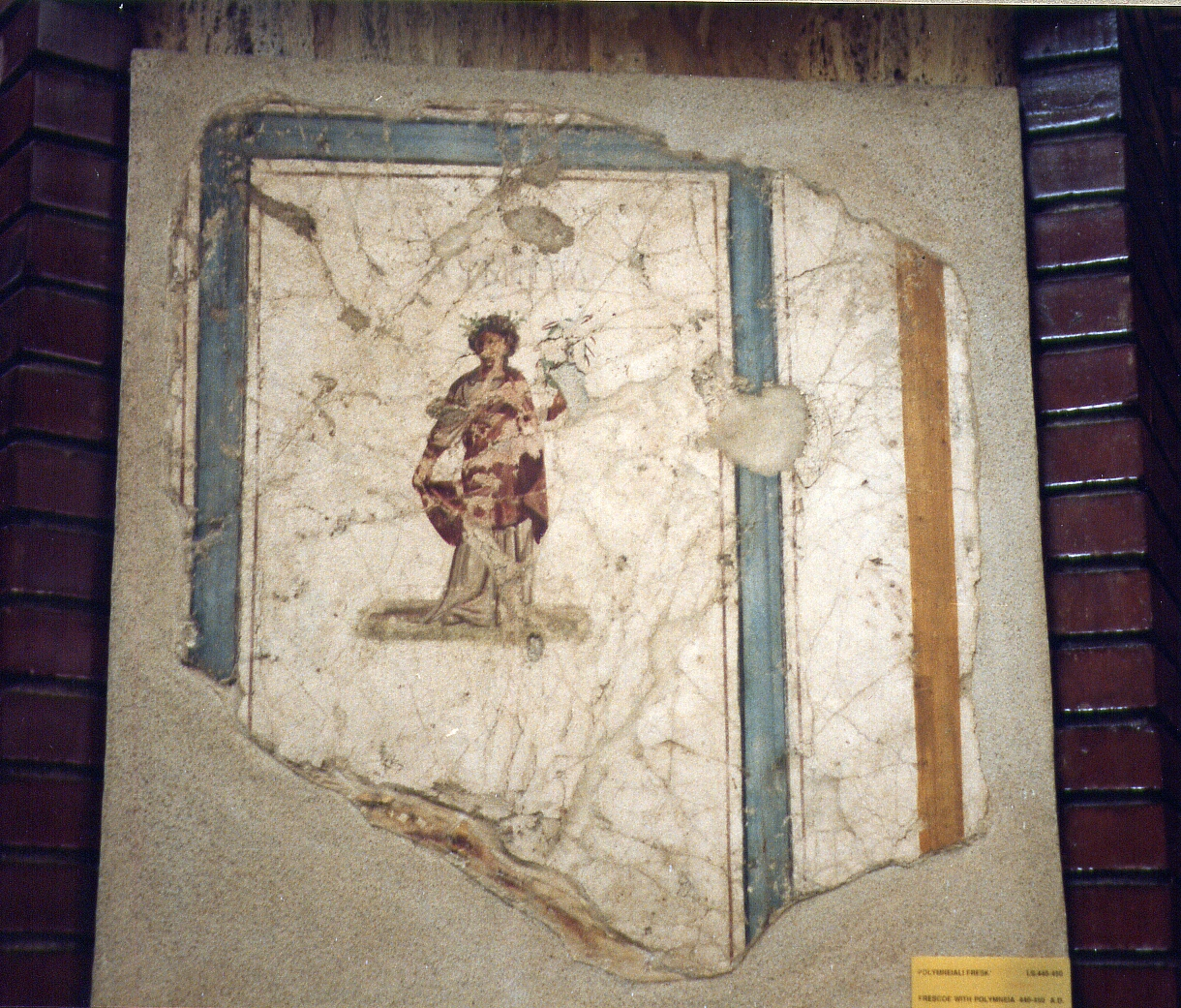 Fresko der Polymneia aus einem Hanghaus in Ephesus, Ephesus-Museum Selçuk, Westtürkei